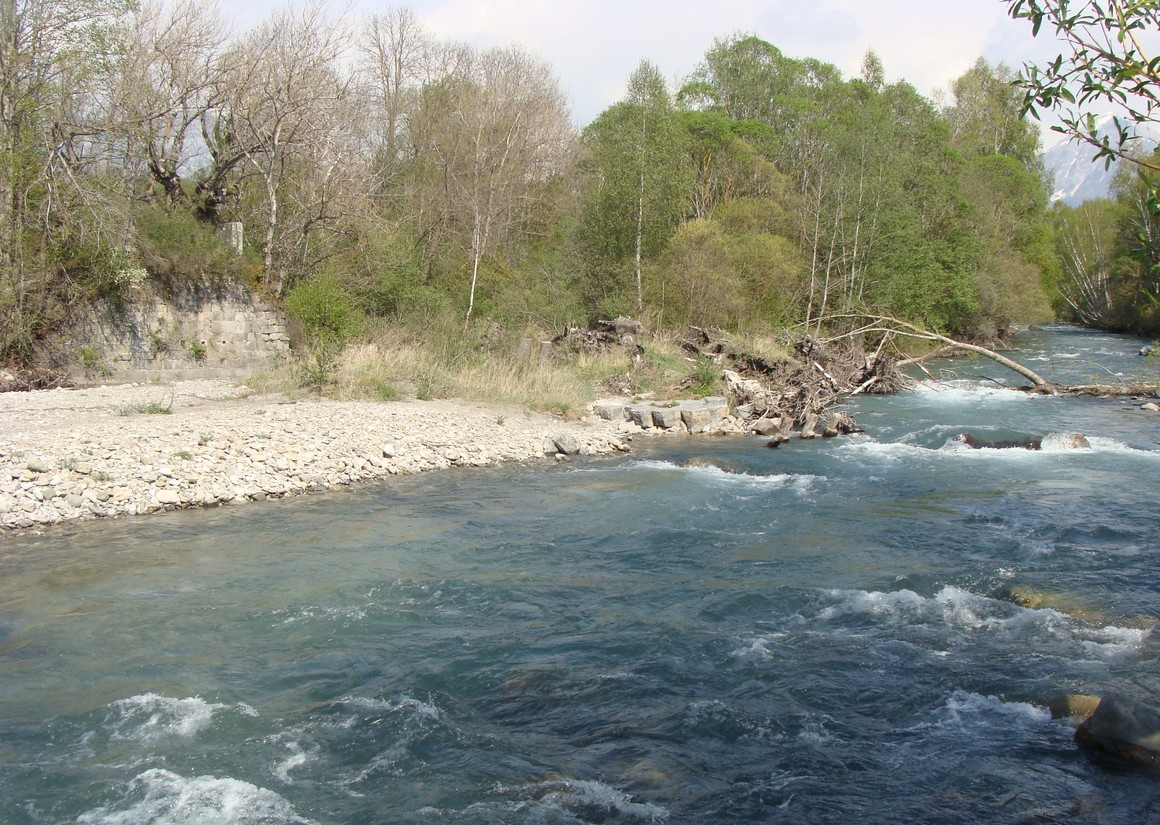 Le Drac au pied de Saint-Julien-en-Champsaur, vu de la rive gauche. On distingue sur la gauche les restes de l'ancrage d'un ancien pont, et au milieu la base d'une pile.